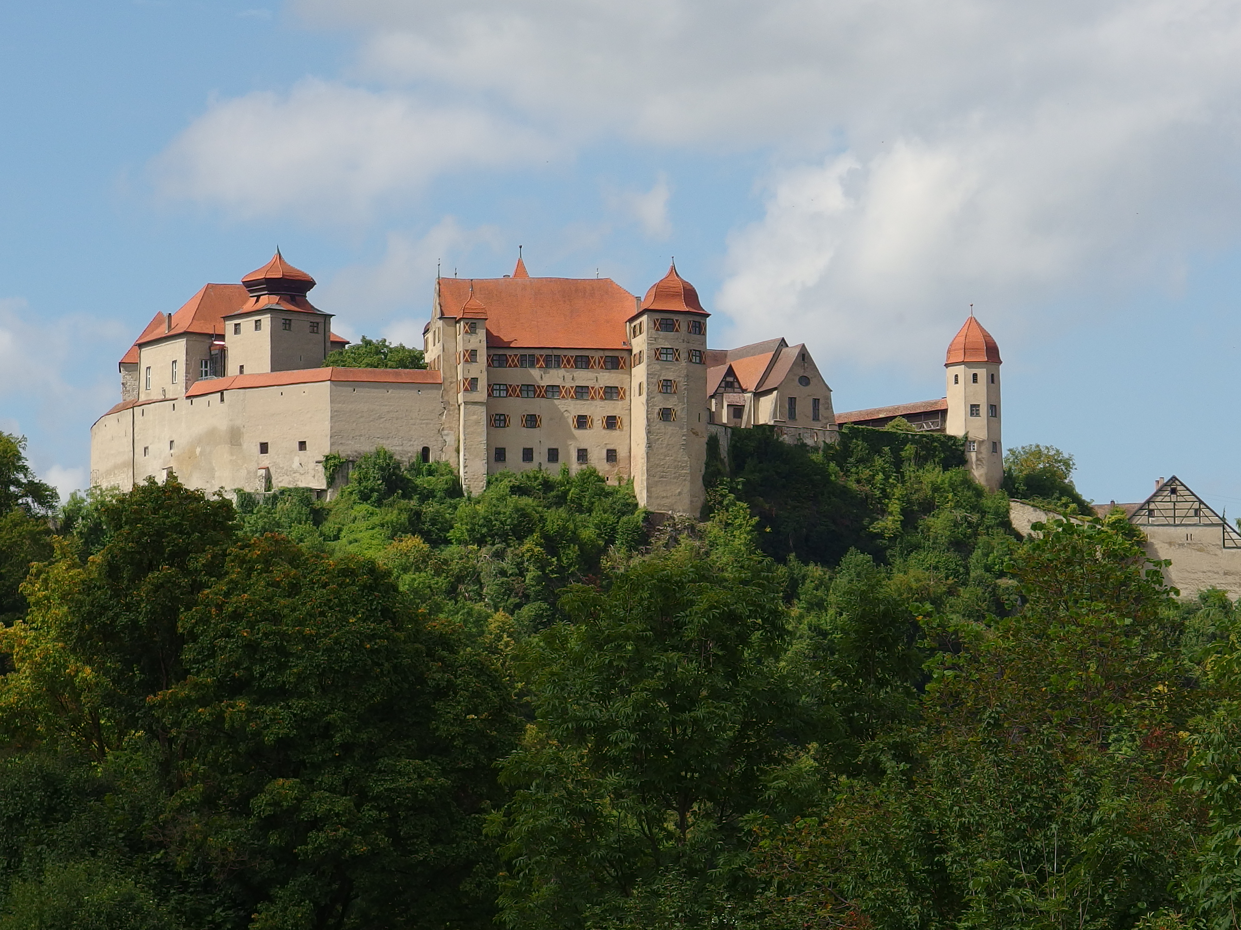 Harburg, Schloß Harburg, Ansicht von Süd, Standort an B25 auf Höhe EisenbahnbrückeThis is a photograph of an architectural monument.